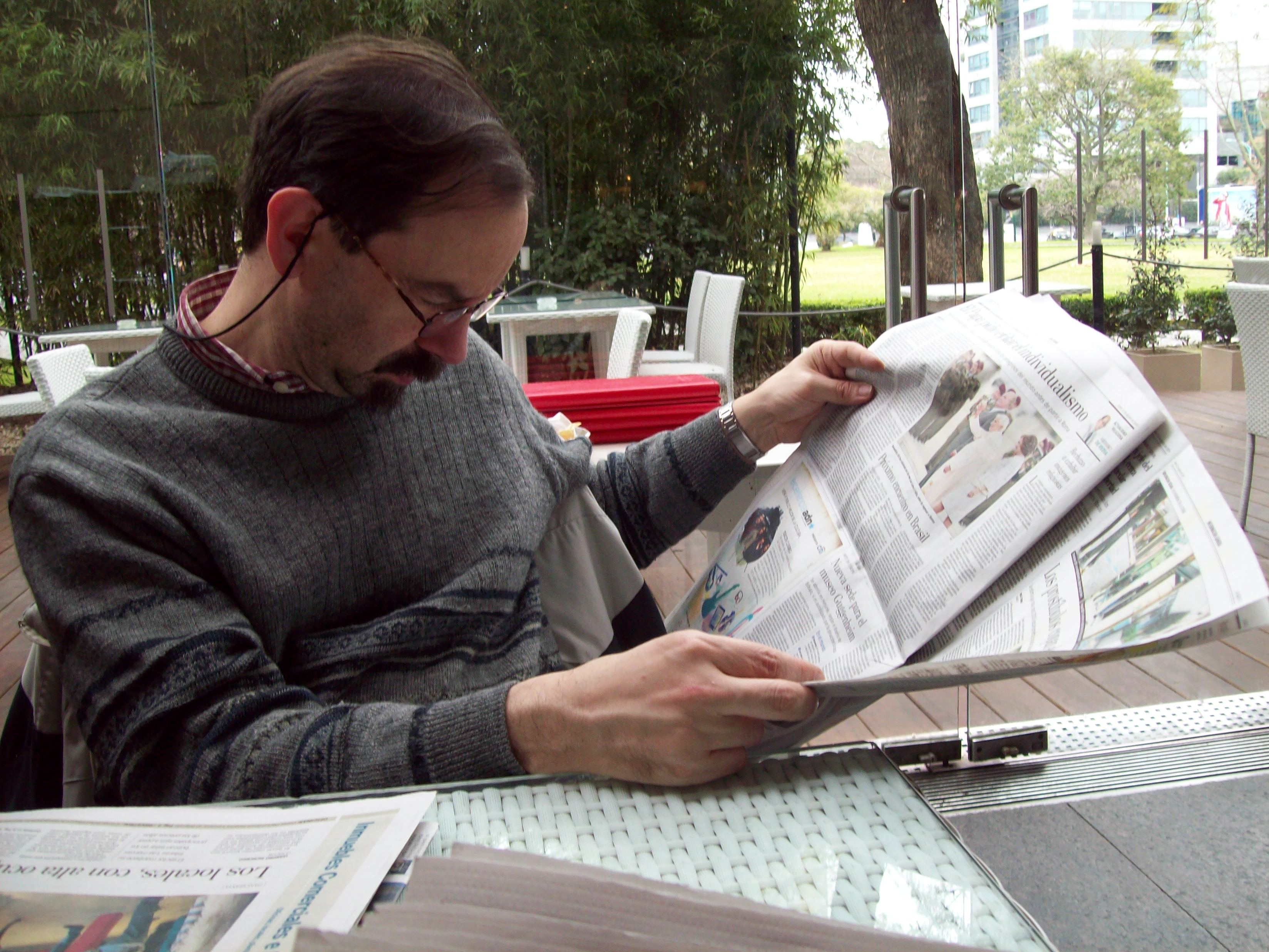 Roberto Fiadone leyendo un diario en el restoran del MALBA.